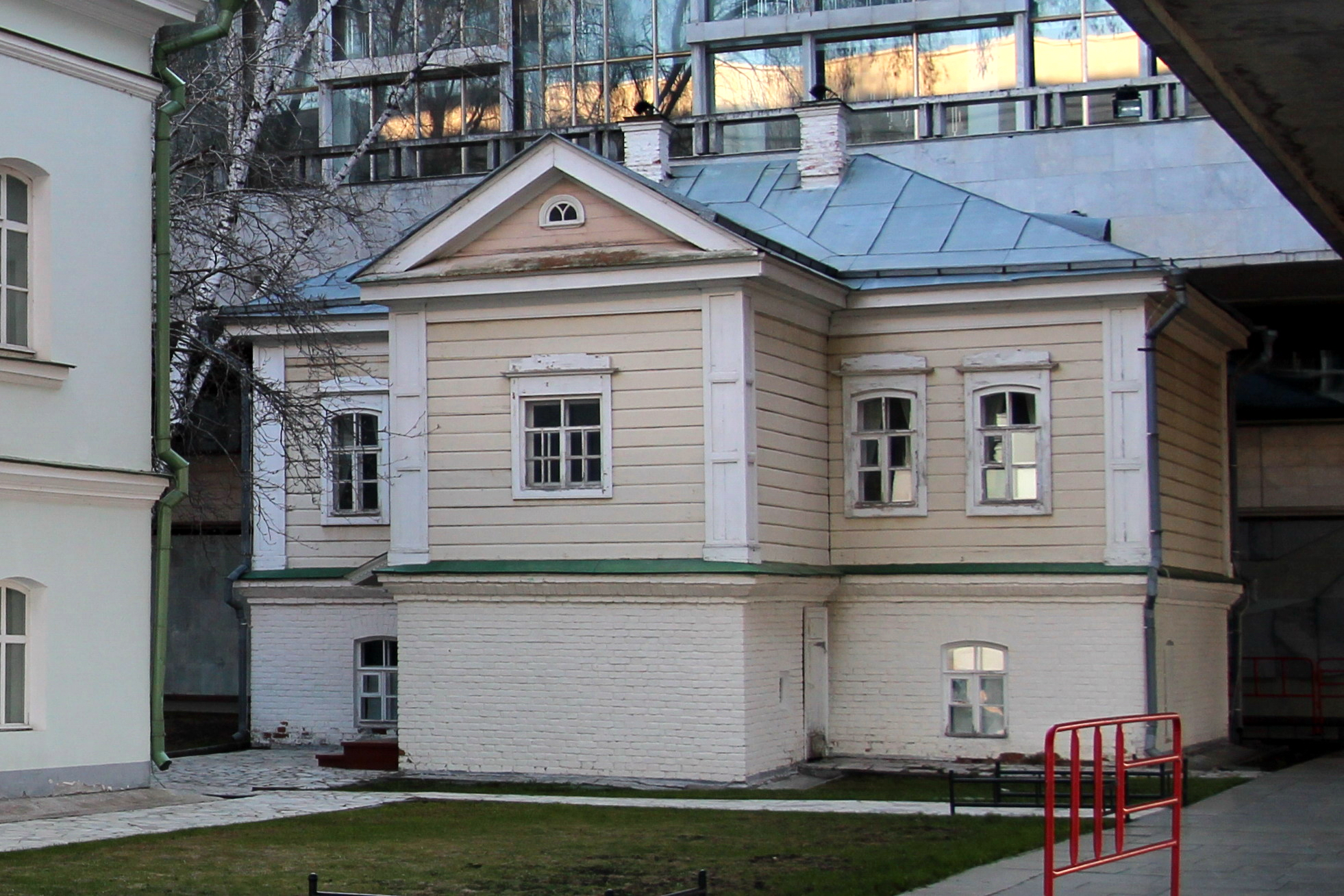 Флигель: площадь 100-летия со дня рождения В.И. Ленина, 1в, Ульяновск, Ульяновская область